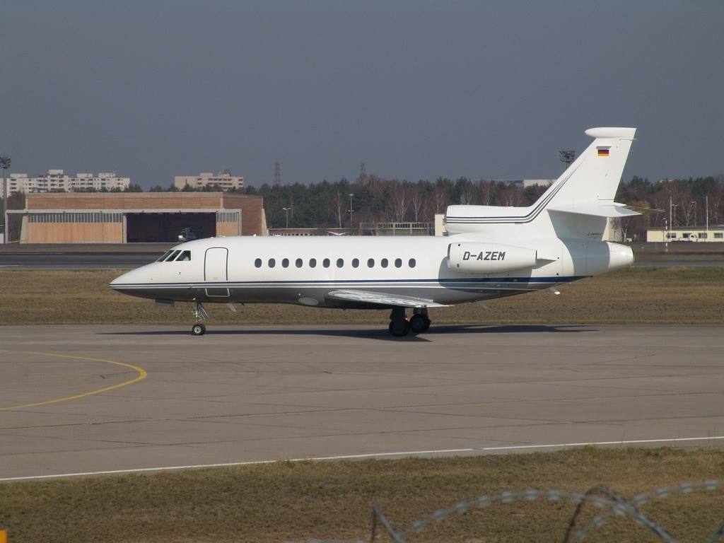 Dassault Falcon 900 der Firma Zeman Flugtechnik und Logistik München